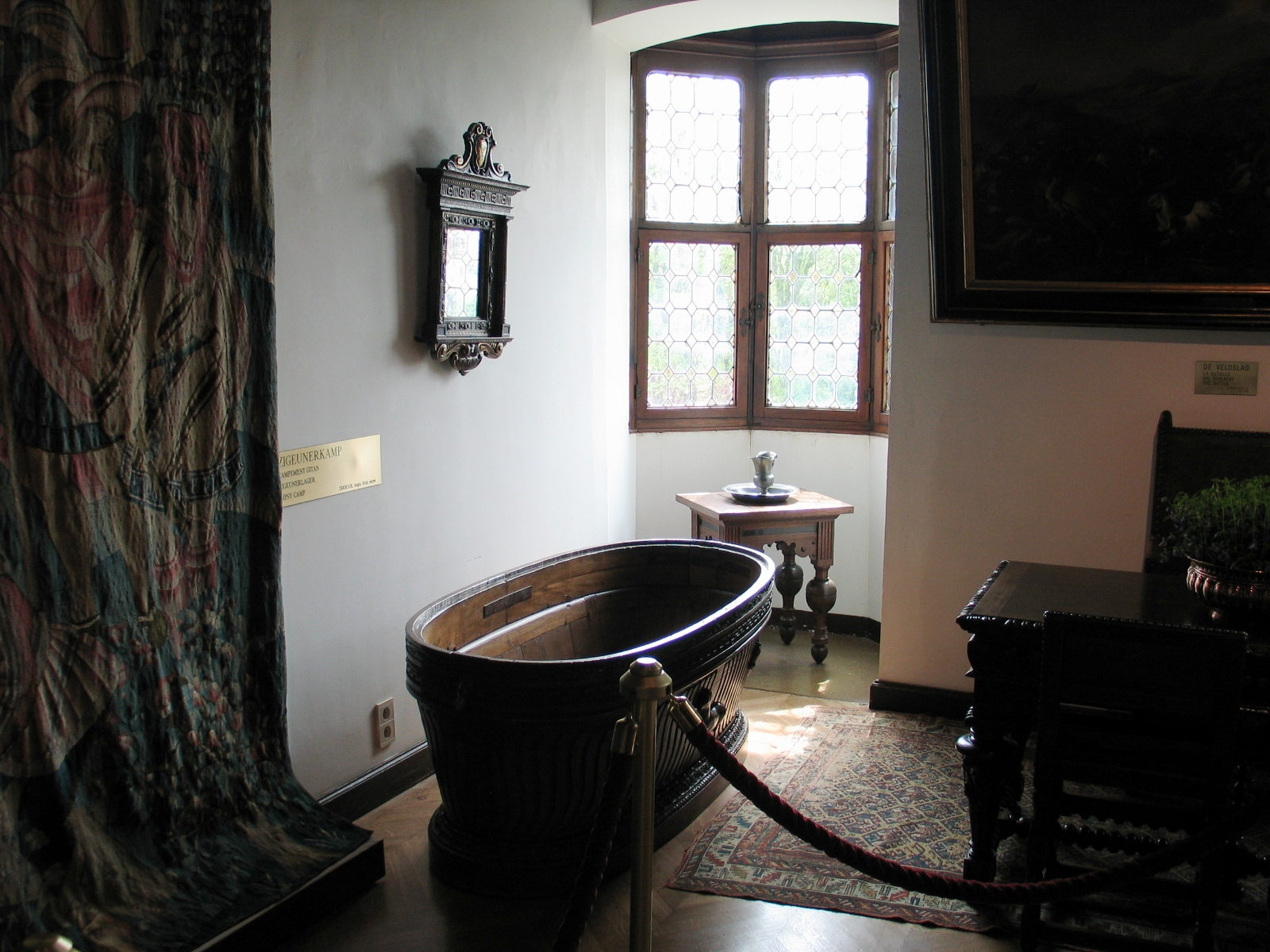 houten badkuip in het kasteel van Gaasbeek - eigen foto